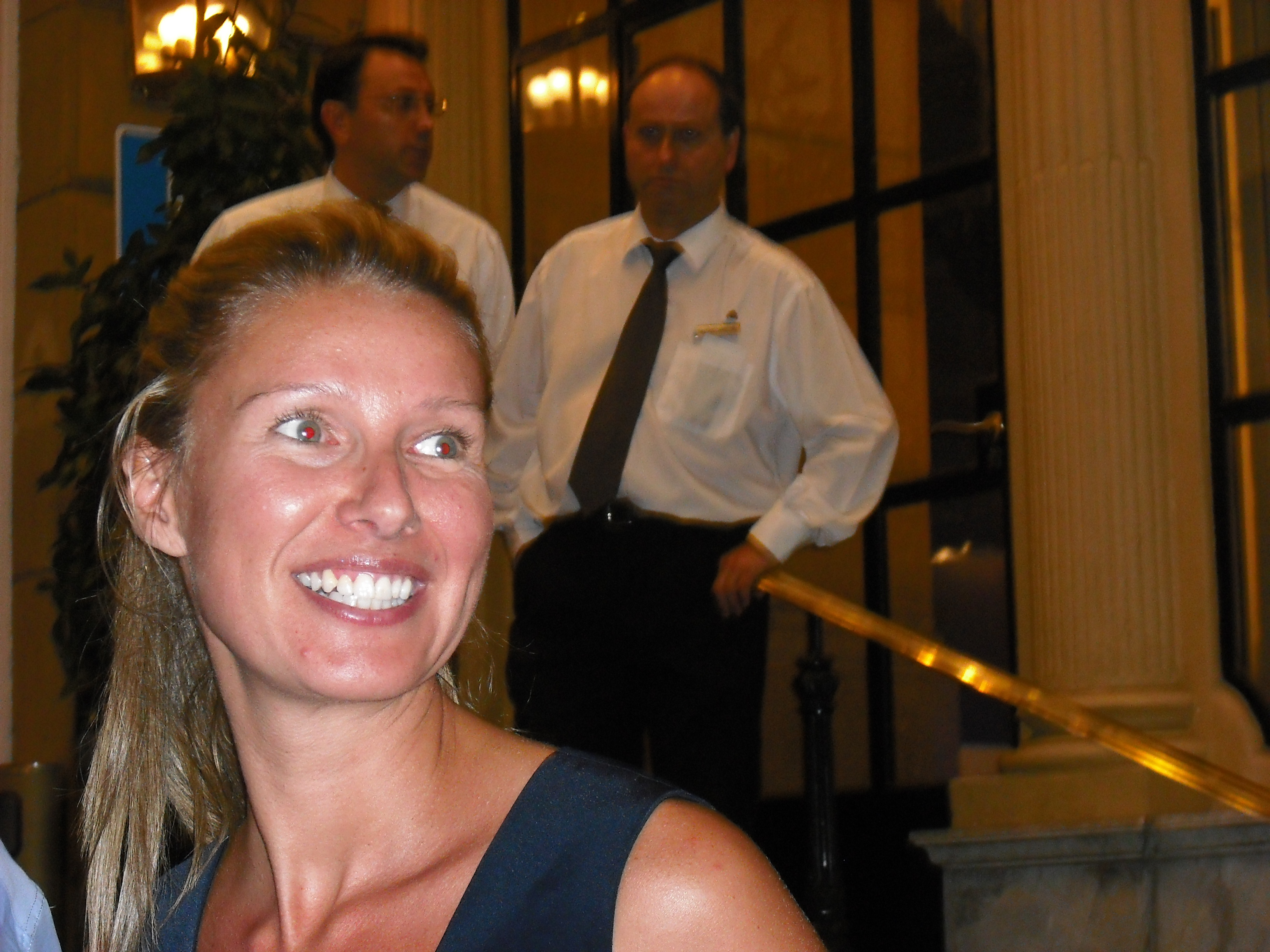 Anne Igartiburu en San Sebastián